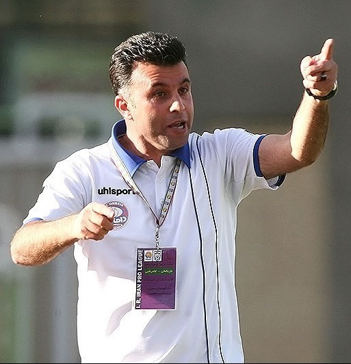 افشین ناظمی مربی داماش گیلان